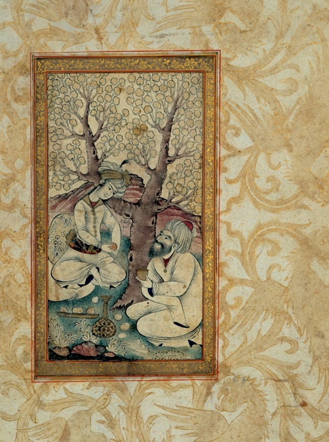 Мохаммад Али Двое мужчин. 1630